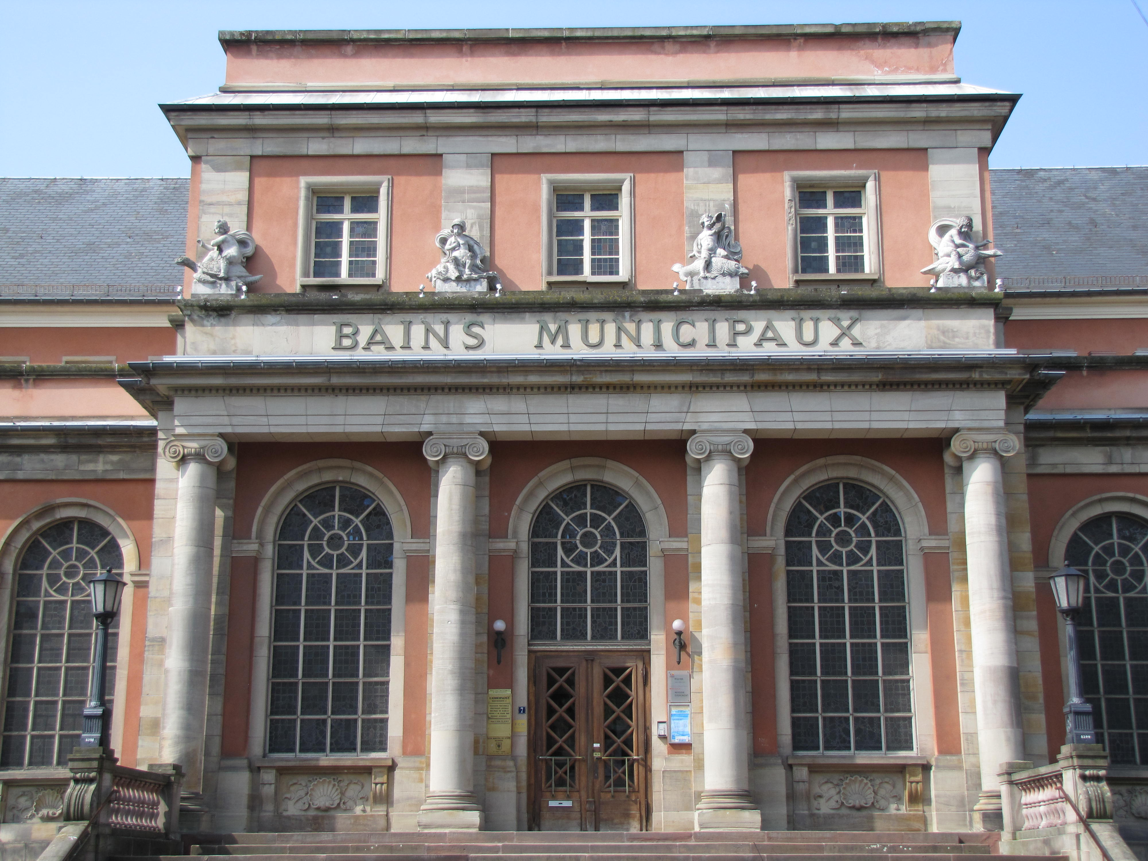 Alsace, Haut-Rhin, Mulhouse, Bains municipaux (1925), rue Pierre Curie. It is indexed in the Base Mérimée, a database of architectural heritage maintained by the French Ministry of Culture, under the references PA68000050 and IA00096519 .